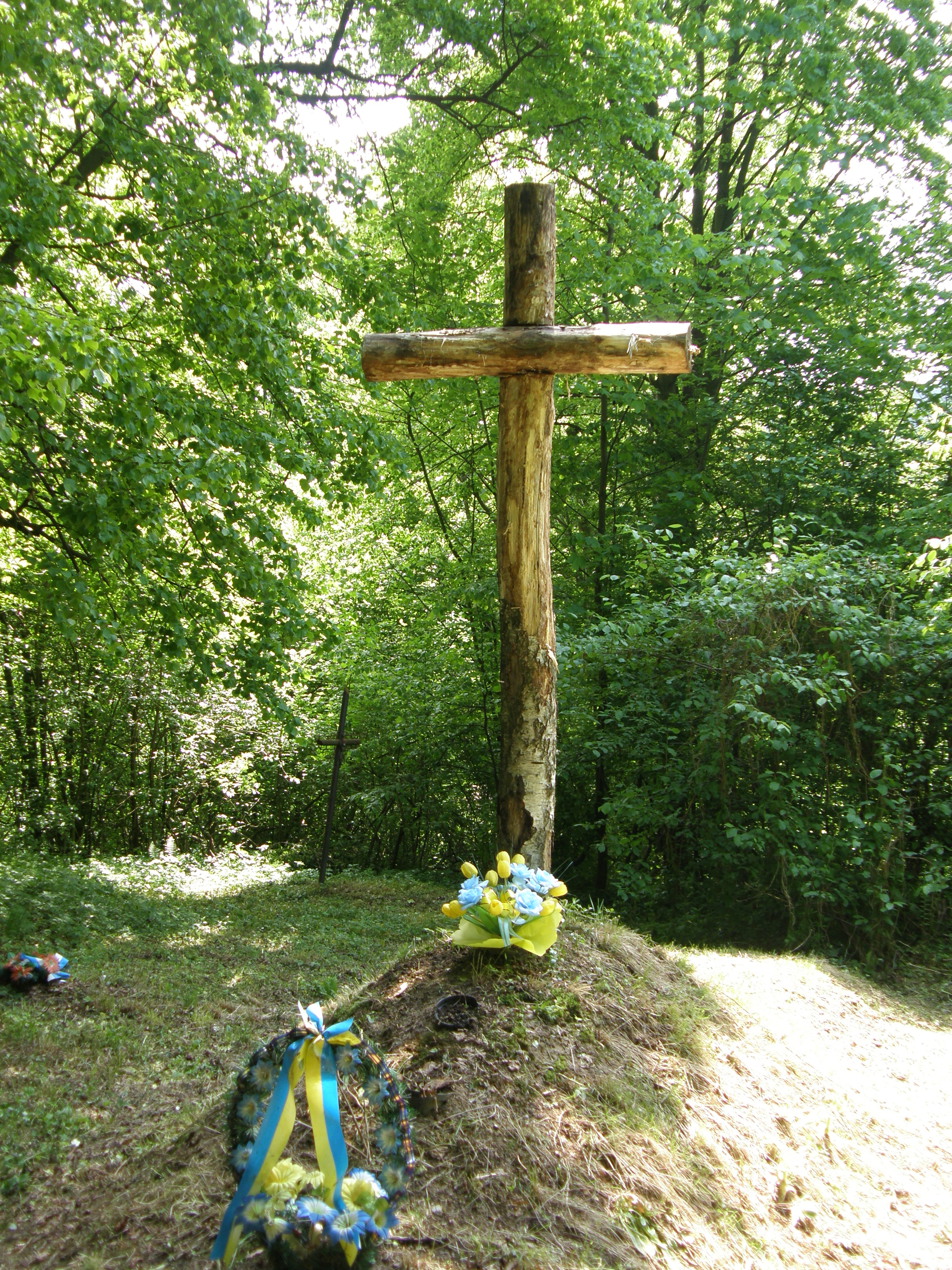 Mogiła Ukraińców zamordowanych w Brzusce w kwietniu 1945 przez polskie oddziały partyzanckie.